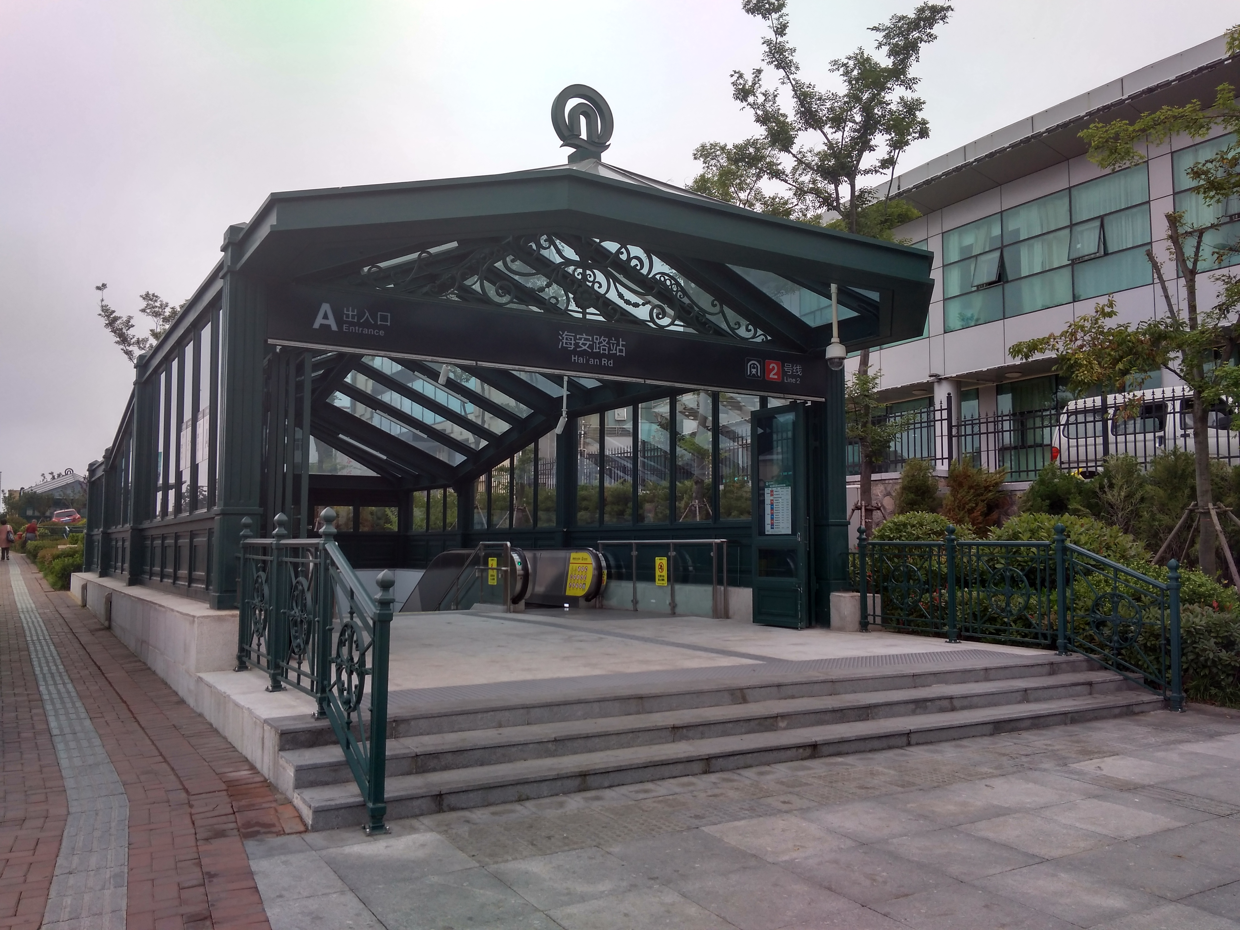 海安路站A出入口